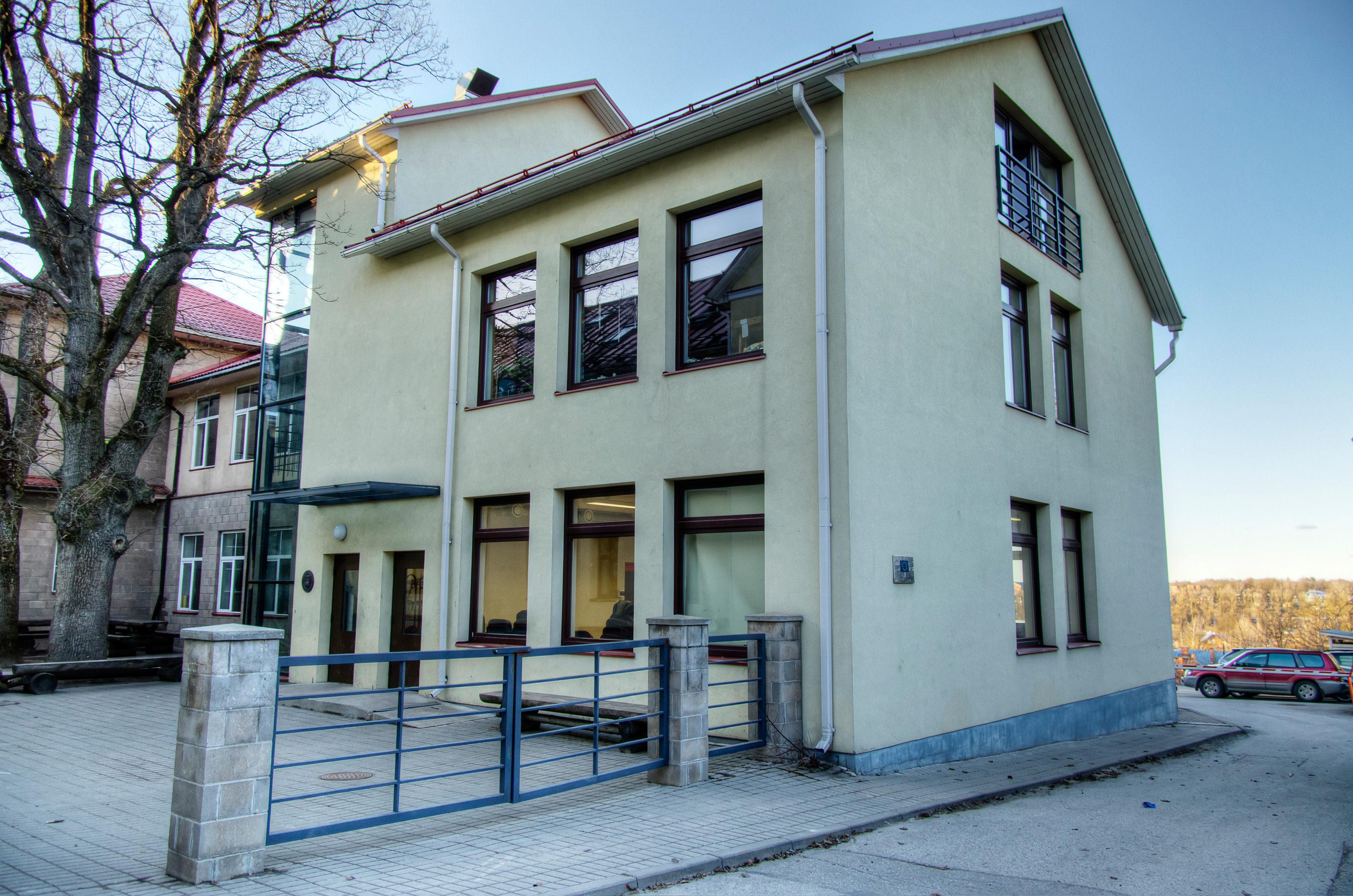 Jakobi Mäe Kultuurikoda Tartu Katoliku kooli sisehoovis